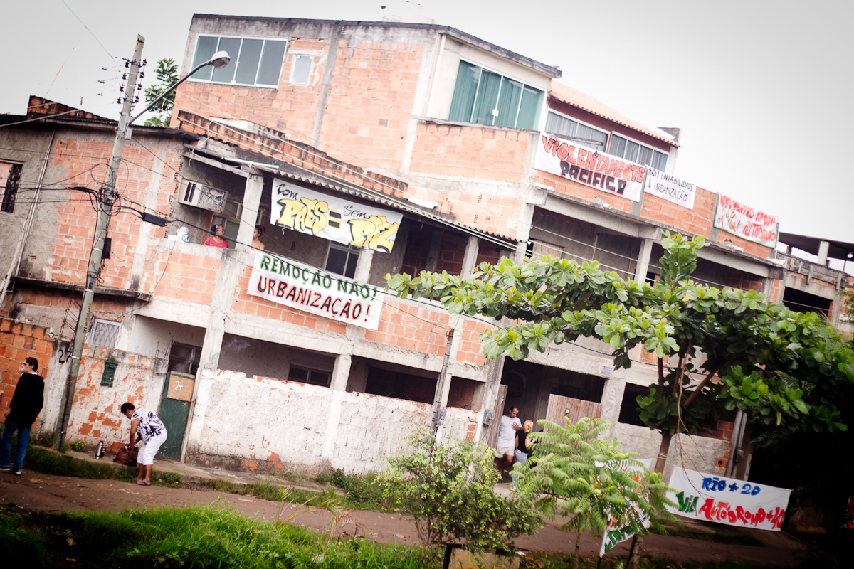 Vários movimentos sociais unidos manifestam solidariedade à Vila Autódromo e todas as Comunidades ameaçadas de remoção. (CC BY-SA) Percurso da Cultura